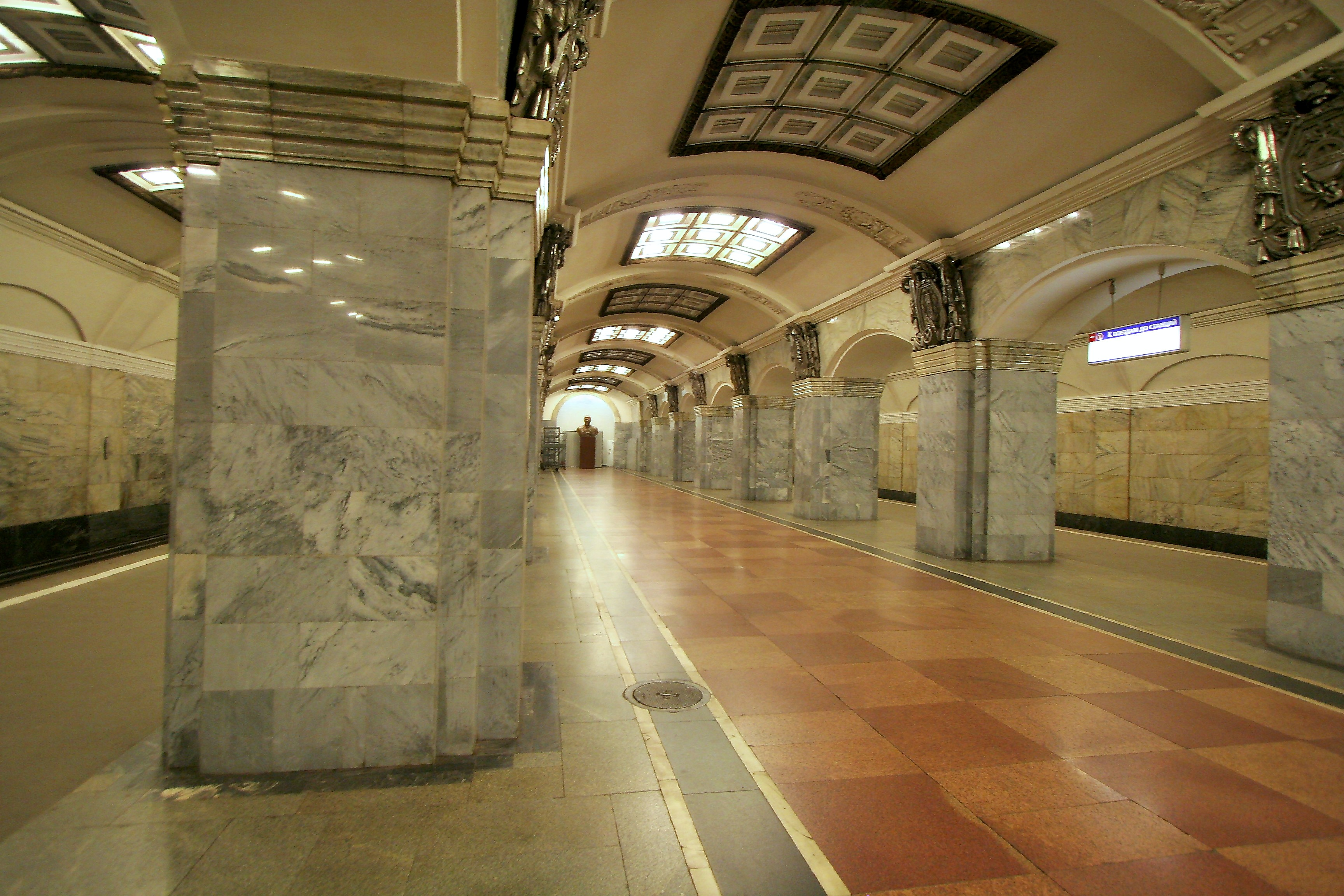 St.Petersburg Metro station Kirovsky Zavod